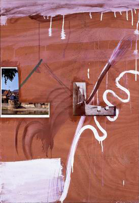 Painting